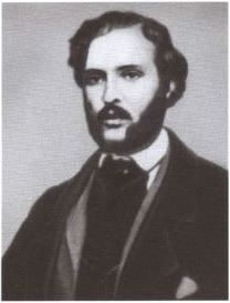 Врангель Александр Егорович - барон, юрист, дипломат. Автор мемуаров о Достоевском